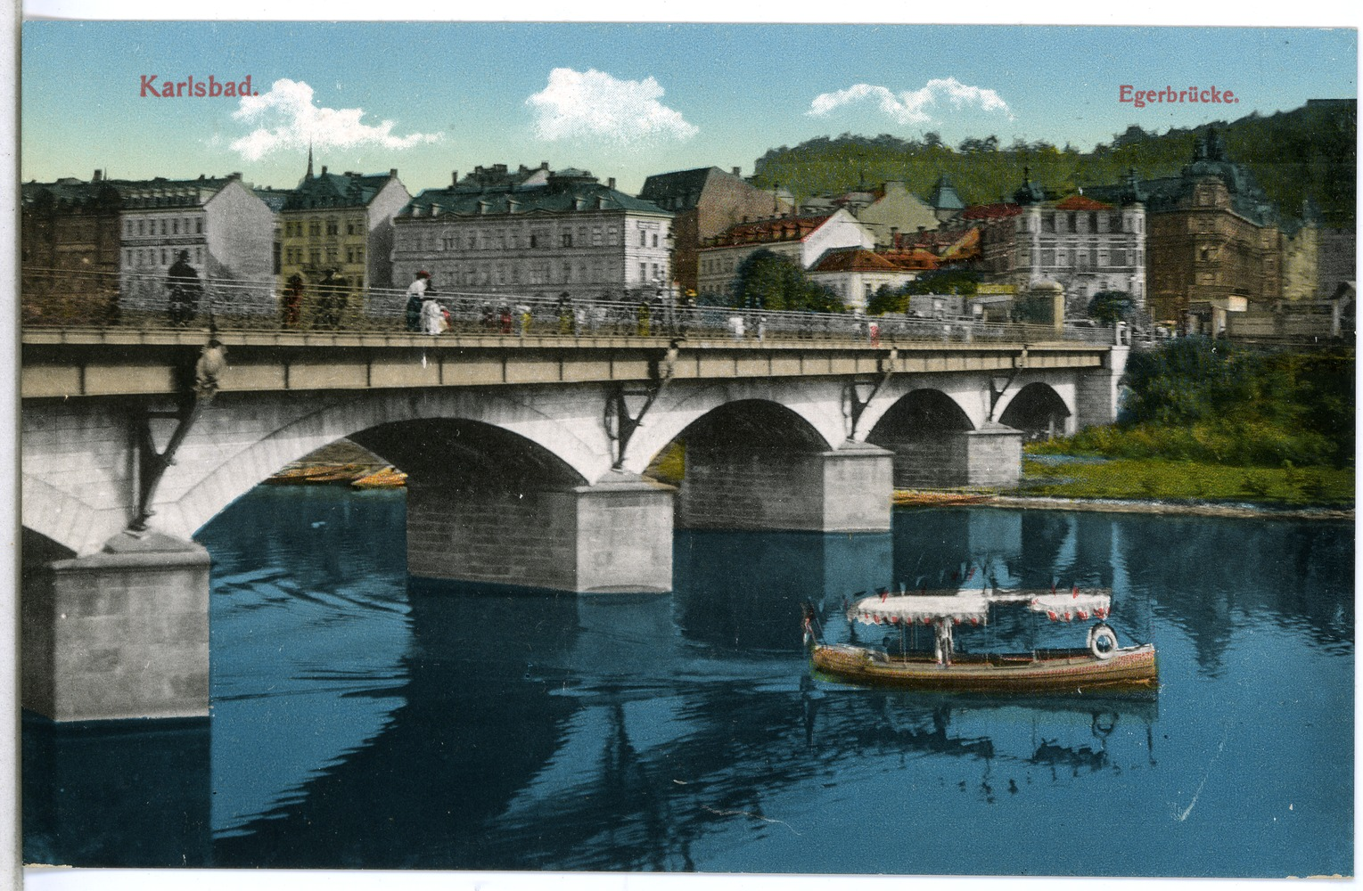 Karlsbad; Egerbrücke This postcard is from publisher Brück & Sohn in Meißen ( postcard has a unique number 14479 and is available in a higher resolution at the publisher. This images was uploaded in a cooperation project between Wikipedians and the publisher.